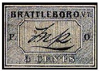 Почтовая марка США, BRATTLEBORO_VT Scott №5X1